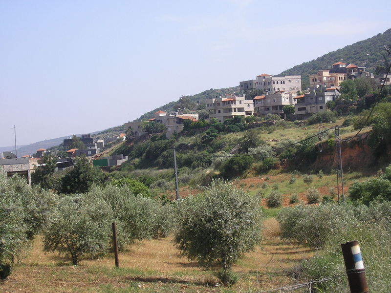 השכונה הצפונית בכפר סלאמה בגליל, ומטעי זיתים. צולם על ידי